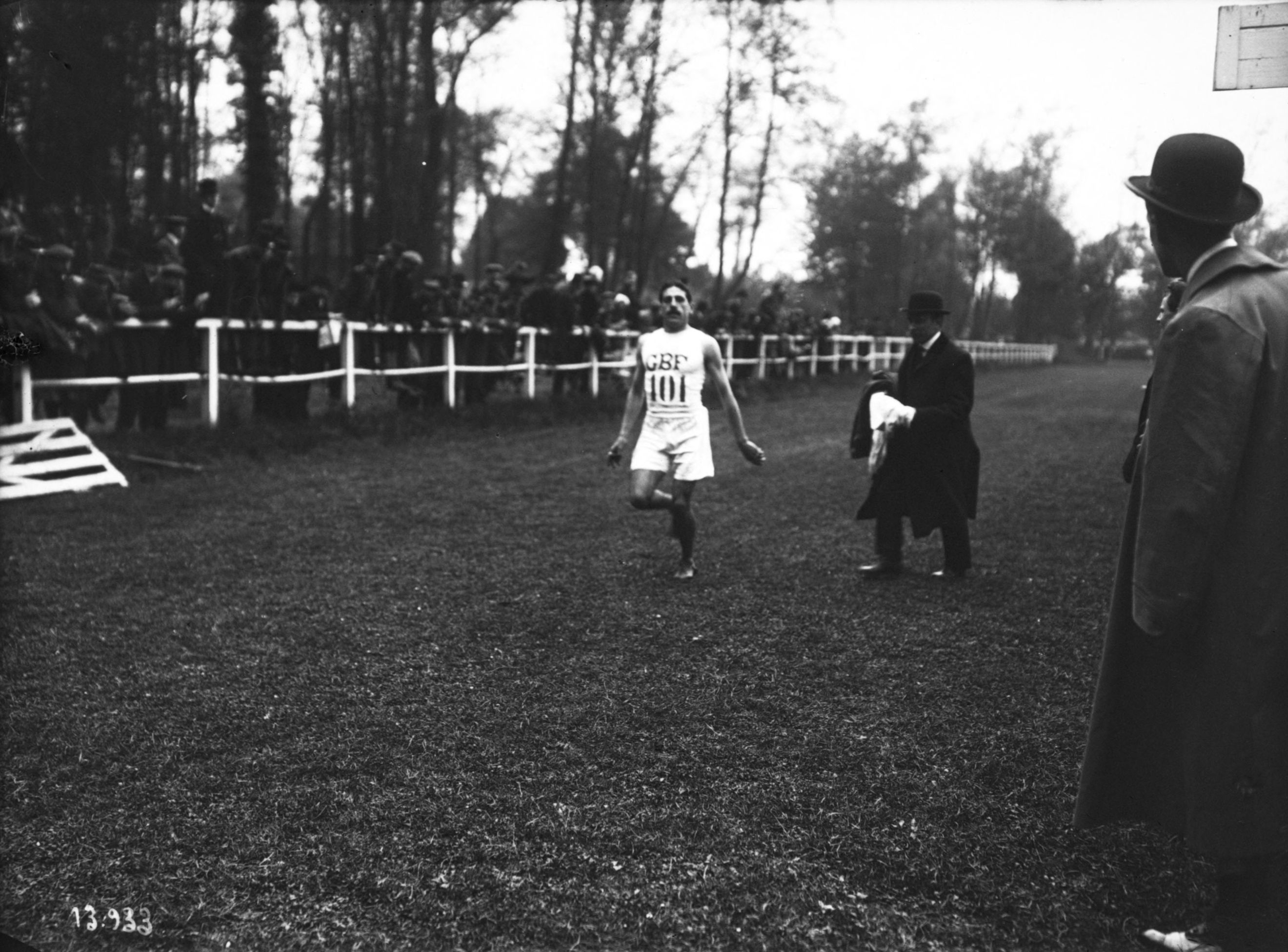 Cross militaire, St Cloud, 30-4-1911, arrivée de Bouin, 1er.